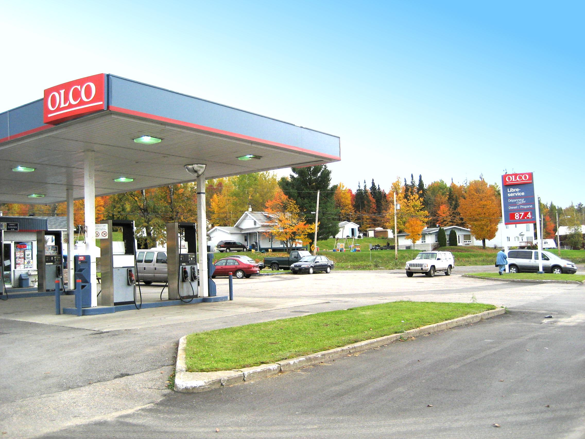 Dépanneur Olco en automne à Stoneham Qc Canada